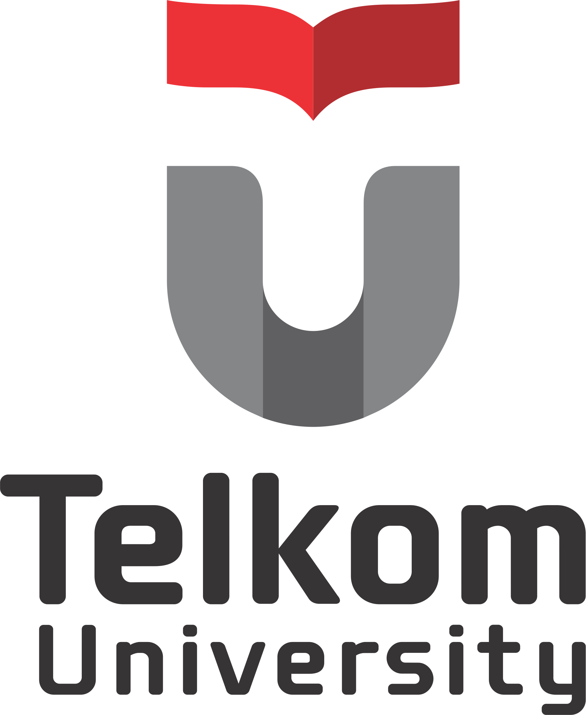 Logo Telkom University, sesuai dokumen statuta di